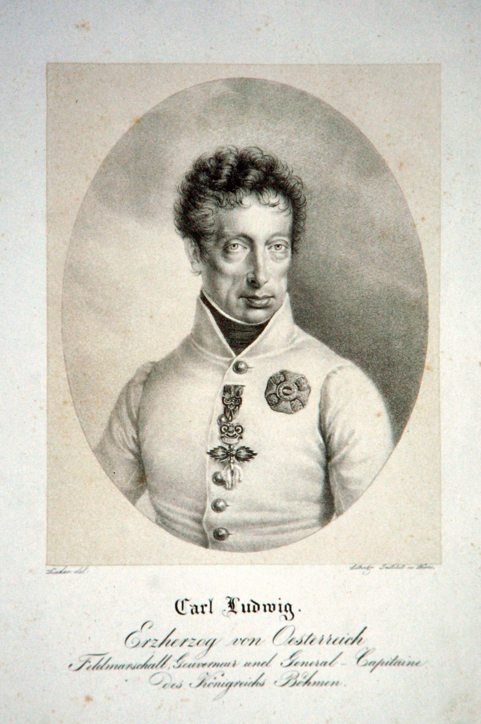 Karl von Österreich (1771-1847), Erzherzog, Feldmarschall. Lithographie von Friedrich Lieder, um 1830